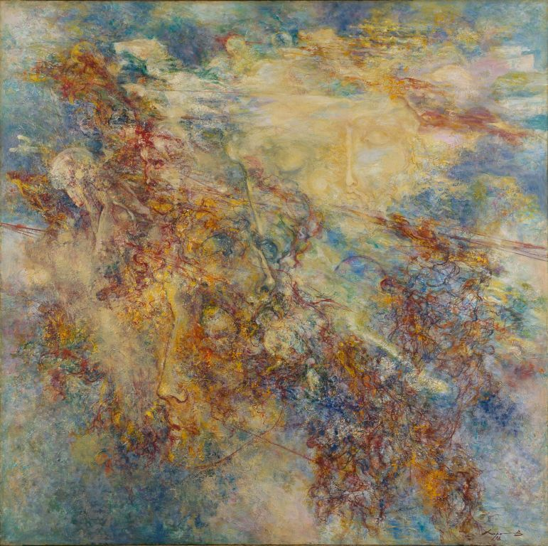 Рабочим названием холста долго оставался «Патмос», — остров, где Иоанн Богослов написал Откровение, — пока дальнейший процесс работы не убедил в необходимости отказа от настойчиво ломившихся образов и символов апокалиптики.